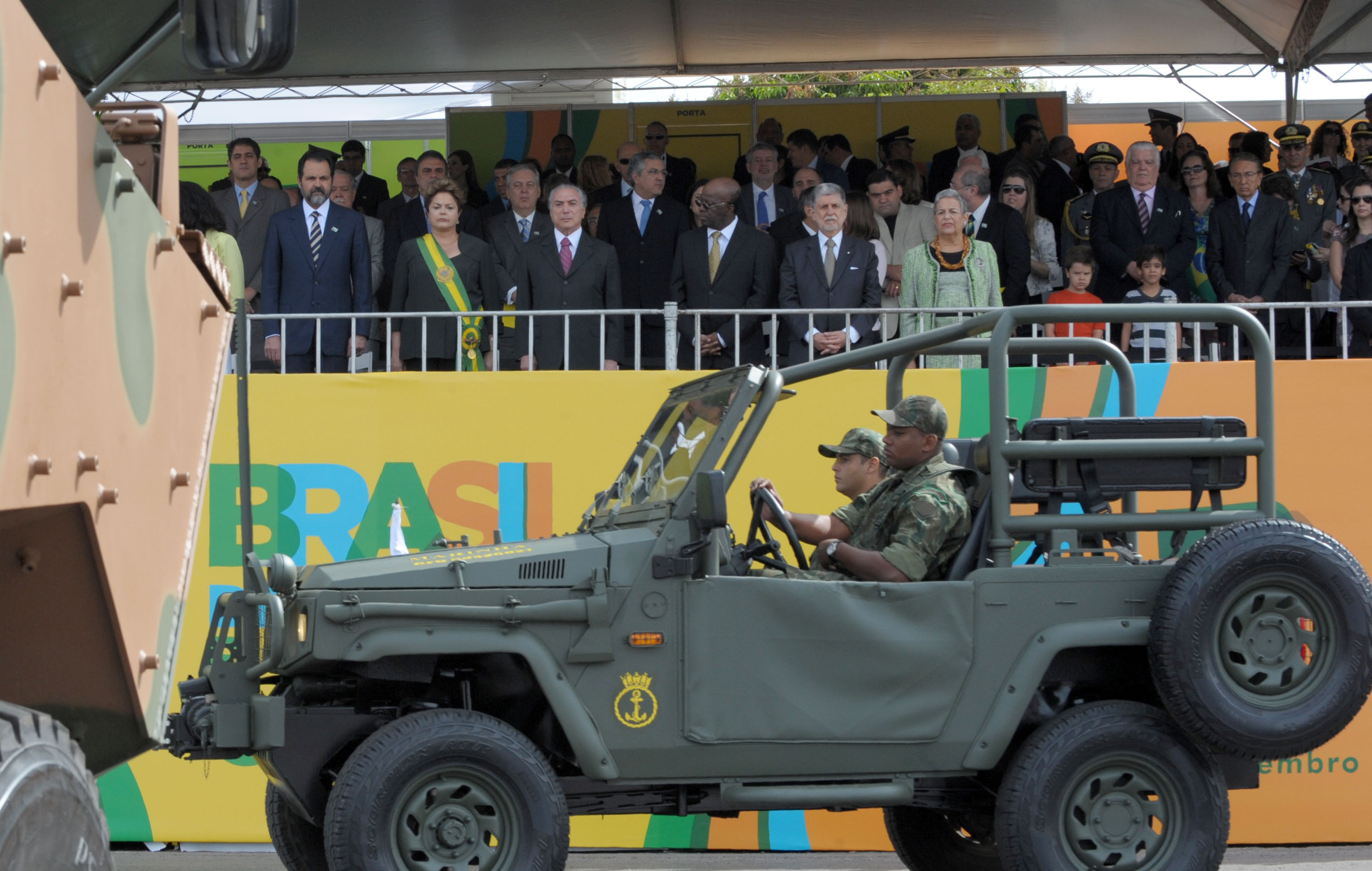 07-09-2013, Brasília - DF. Fotos: Jorge Cardoso.